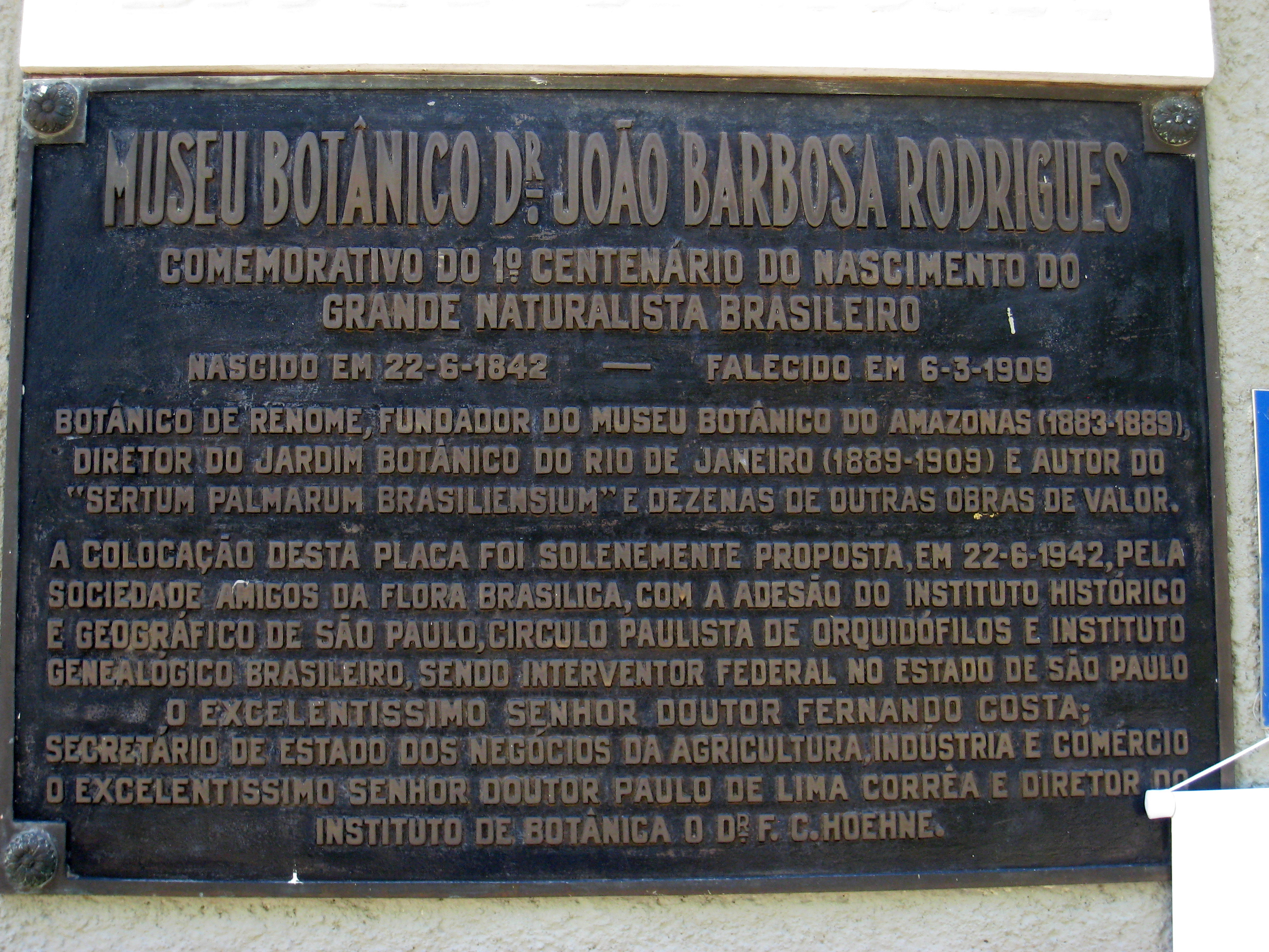 Museu Botânico Dr. João Barbosa Rodrigues, Jardim Botânico de São Paulo, São Paulo City, SP, Brazil.